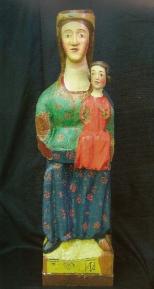 Representación de la Virgen María. Talla del S. XII